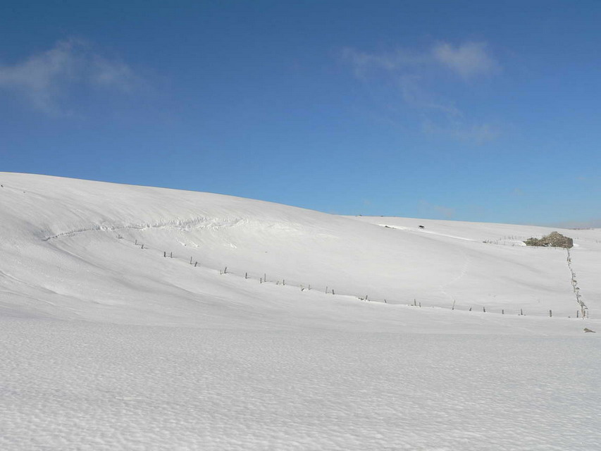 L'Aubrac en hiver - accumulation de neige